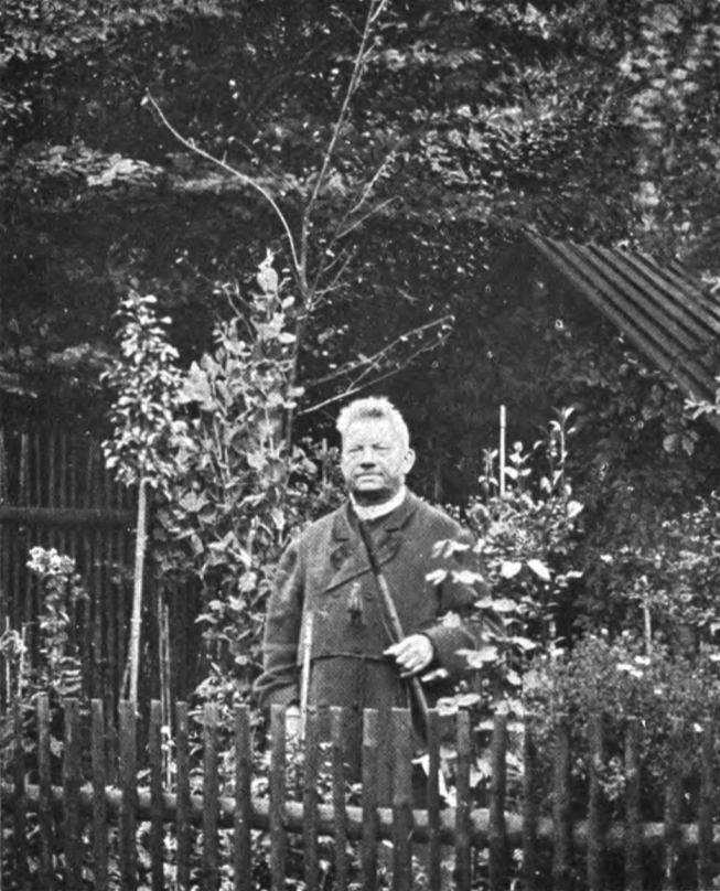 Hornjoserbsce: Handrij Dučman (1836–1909); farar, serbski spisowaćel a basnik.